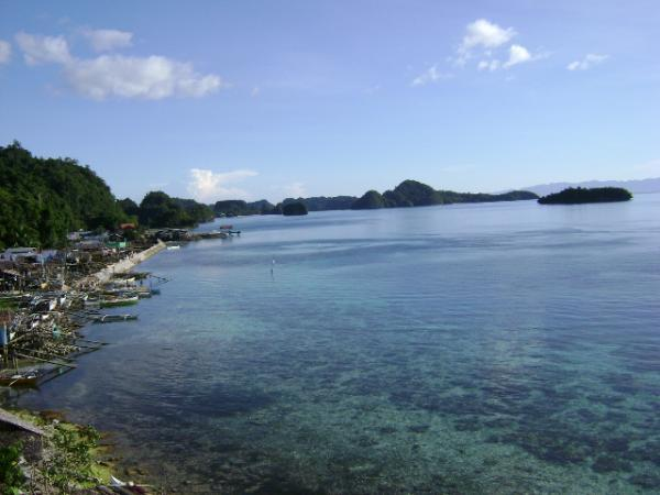 Magsaysay